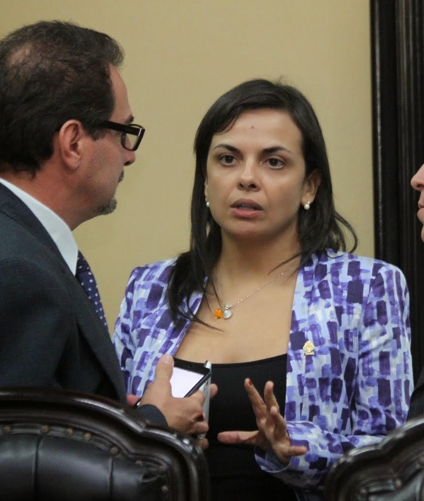 Diputado 2014-2018 por el PAC, Costa Rica